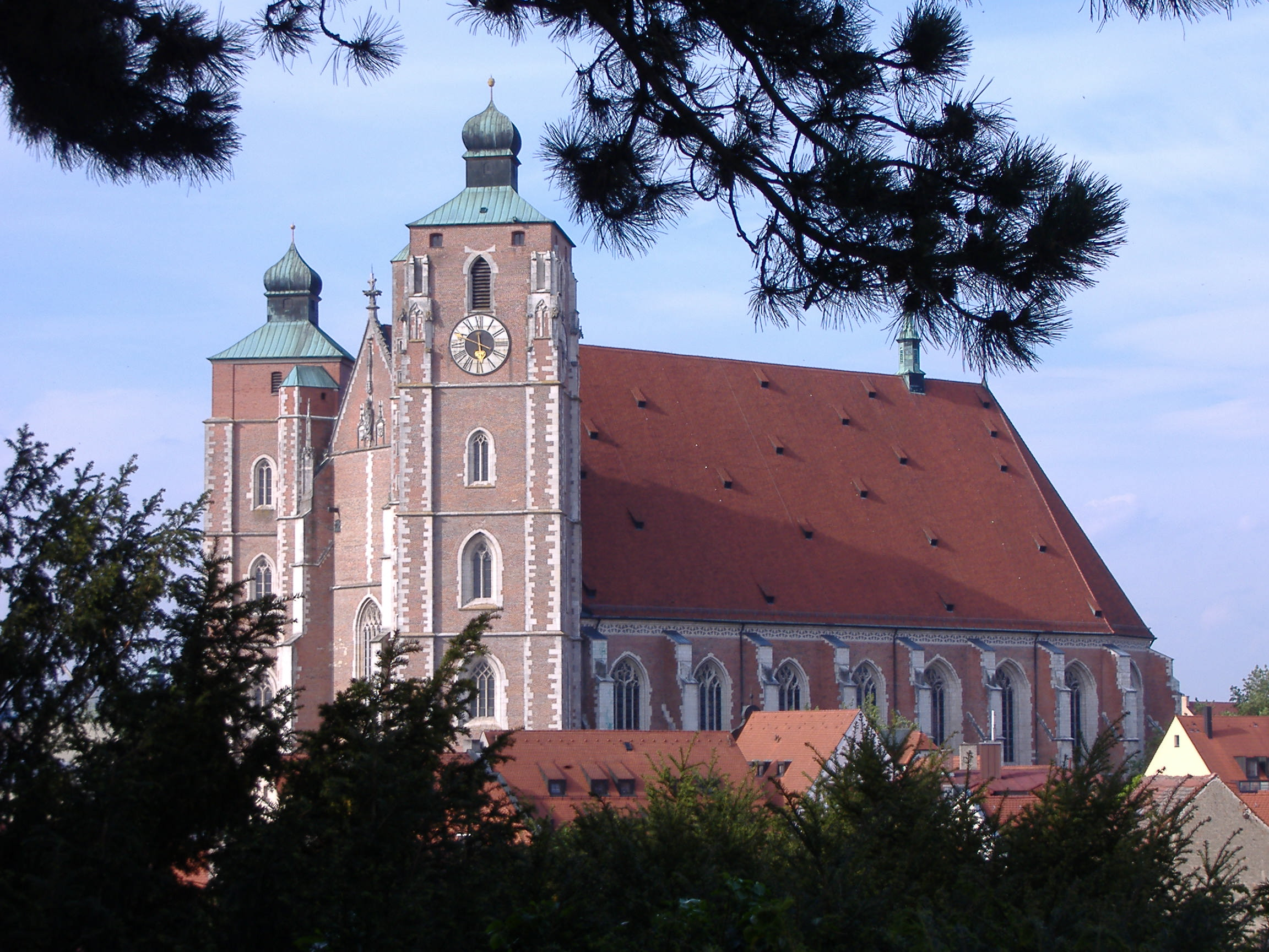 Das Münster vom Scherbelberg aus gesehen.